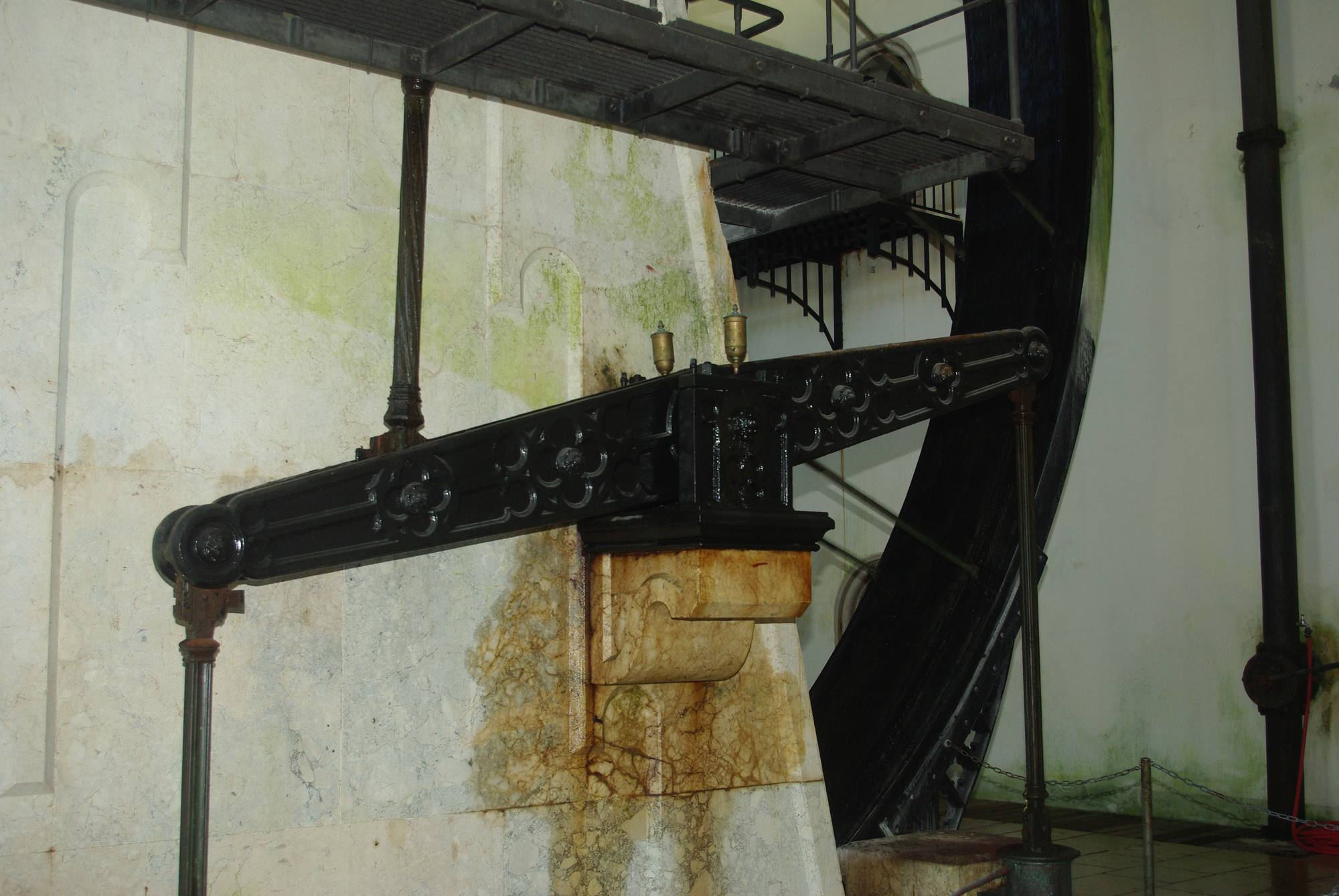 Alte Saline in 83435 Bad Reichenhall, Maschinenhalle im Hauptbrunnhaus; Antrieb der Pumpen (Außenseite Süden) This is a photograph of an architectural monument.